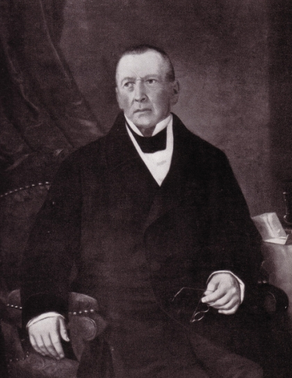 Portrait Alois (Aron Baruch) Dessauer Papierfabrikant ehem.Hofbankier (* 21. Februar 1763 Gochsheim (Kraichtal), † 11. April 1850 Aschaffenburg)